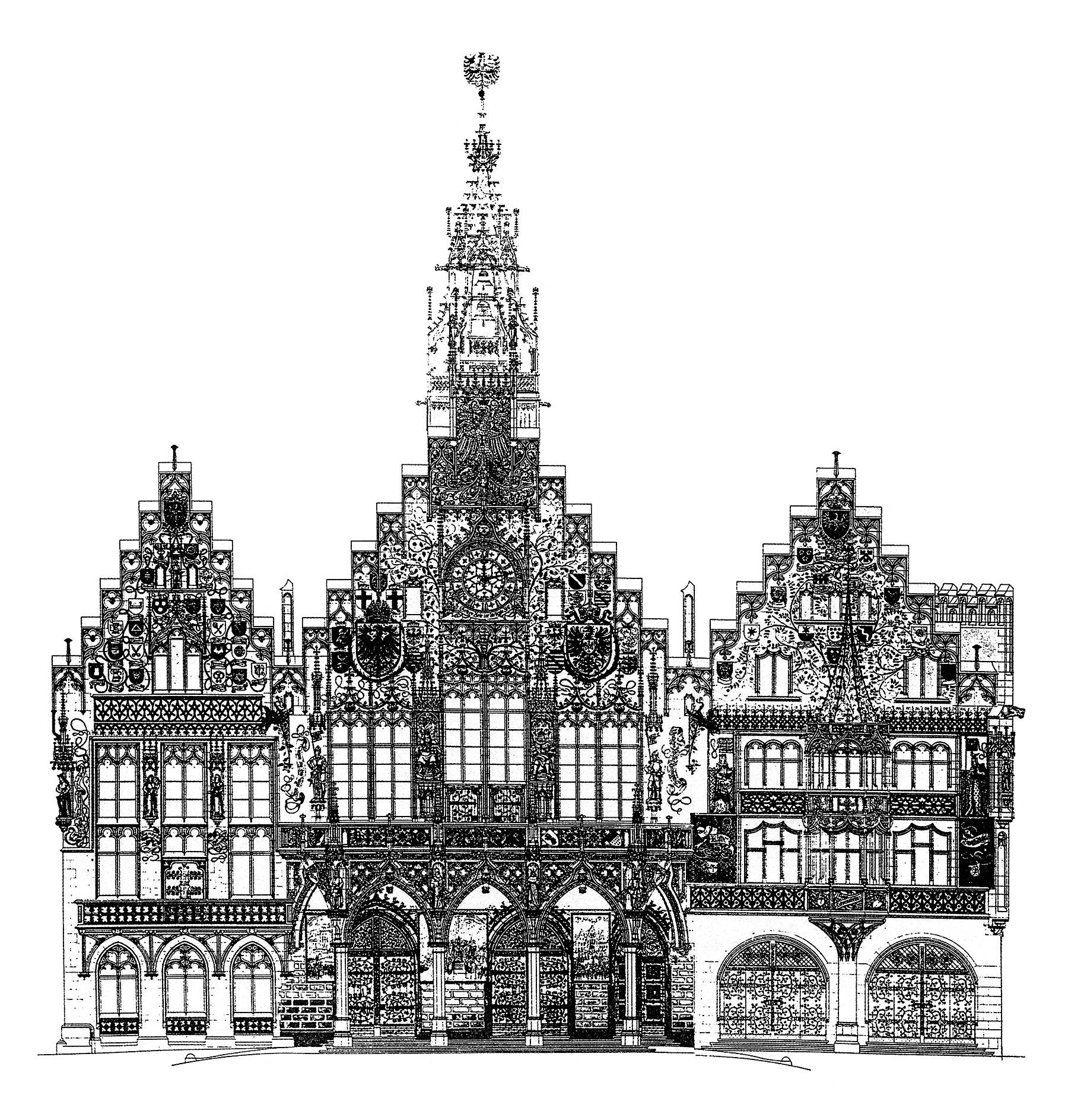 Siegerentwurf Max Meckels zur neugotischen Umgestaltung des Frankfurter Römers. Das (leider qualitativ schlechte) Bild zeigt den ursprünglichen Entwurf „Dreigiebel“, mit dem Meckel zusammen mit dem bekannten Frankfurter Maler Peter Becker im Oktober 1889 als Sieger aus dem Wettbewerb hervor trat, den die Stadt anlässlich der Neugestaltung der Römerfassade ausgeschrieben hatte. Deutlich ist zu sehen, dass dieser ursprüngliche Entwurf nicht nur eine völlige Veränderung der Fensteranordnung vorsah, sondern auch wesentlich mehr Gestaltung durch Fassadenmalerei beabsichtigte, von der man letztlich völlig zurücktrat. Schon direkt nach dem Wettbewerb wurde Meckel um Vorlage einer weniger aufwändigen Fassung gebeten.